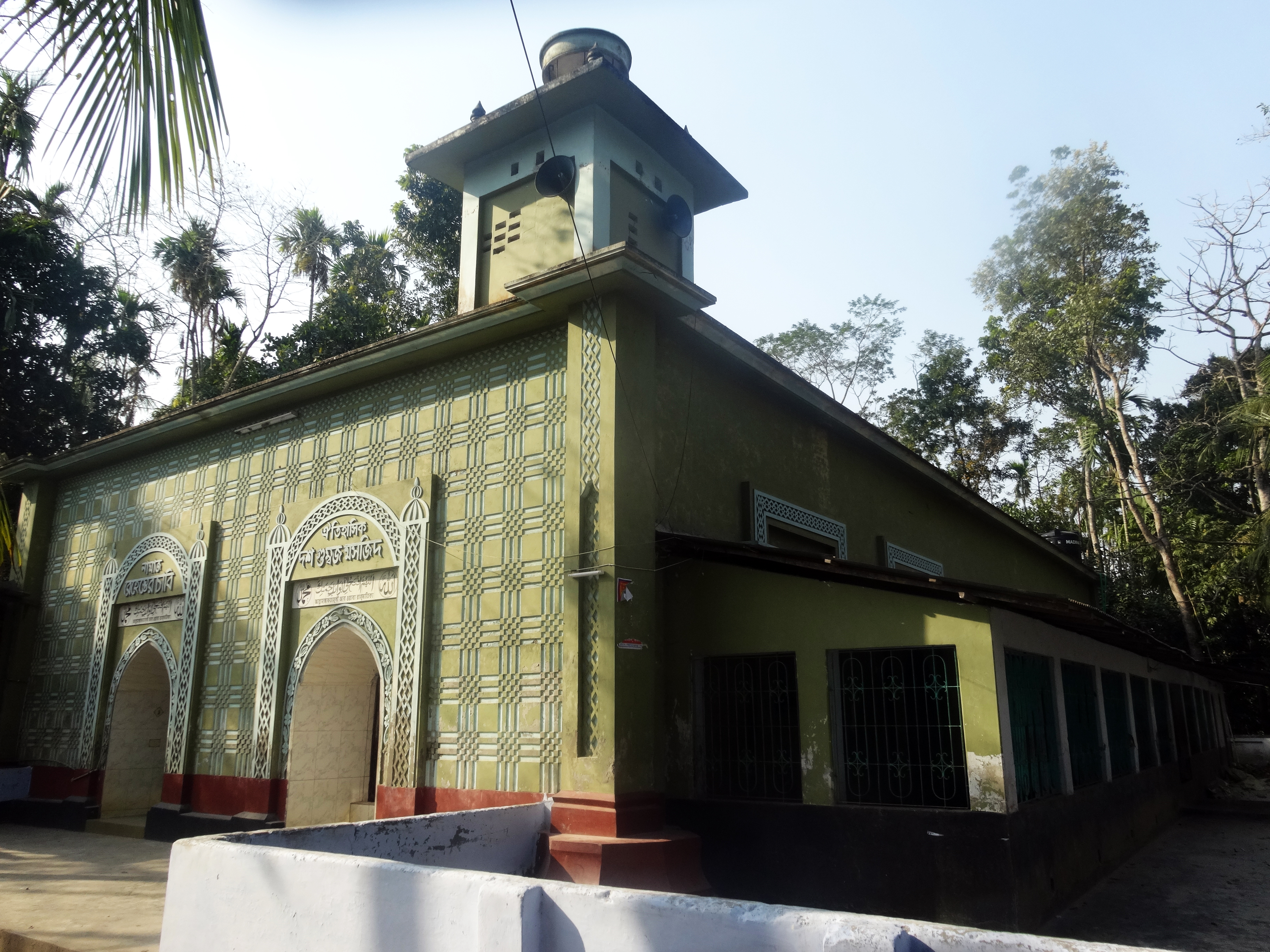 দশ গম্বুজ মসজিদ